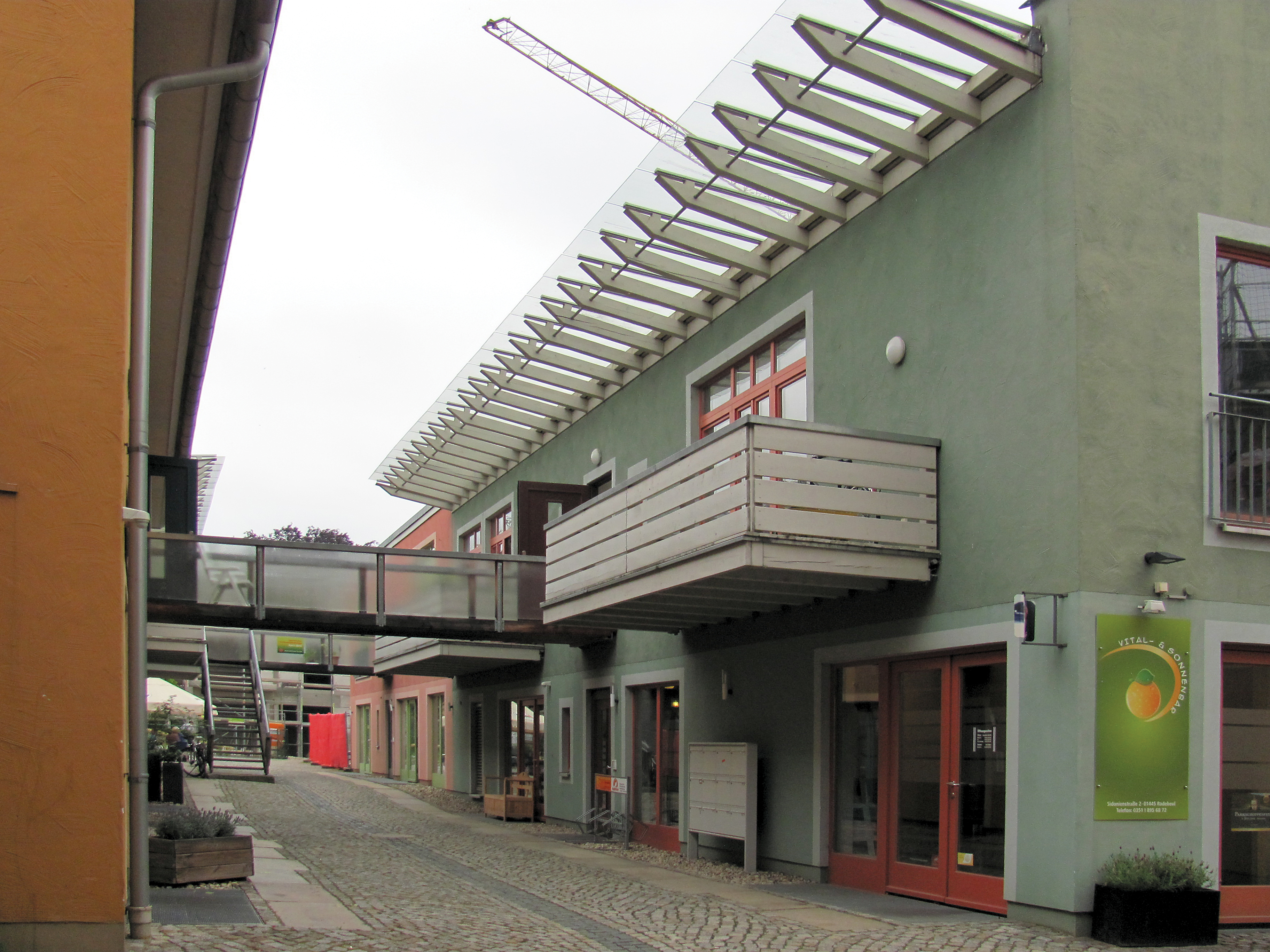 Radebeul, Passage Sidonienstraße 2 im Innenraum